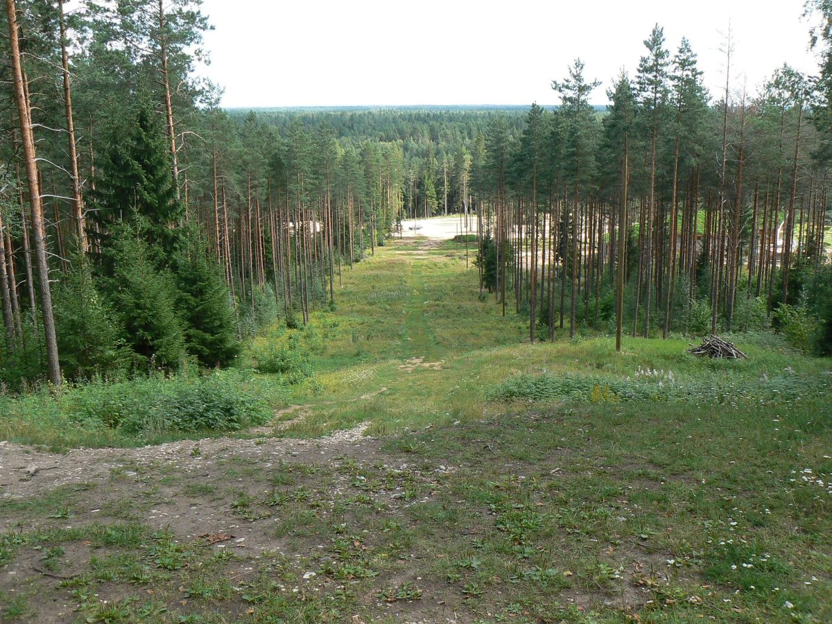 Valgehobusemägi.